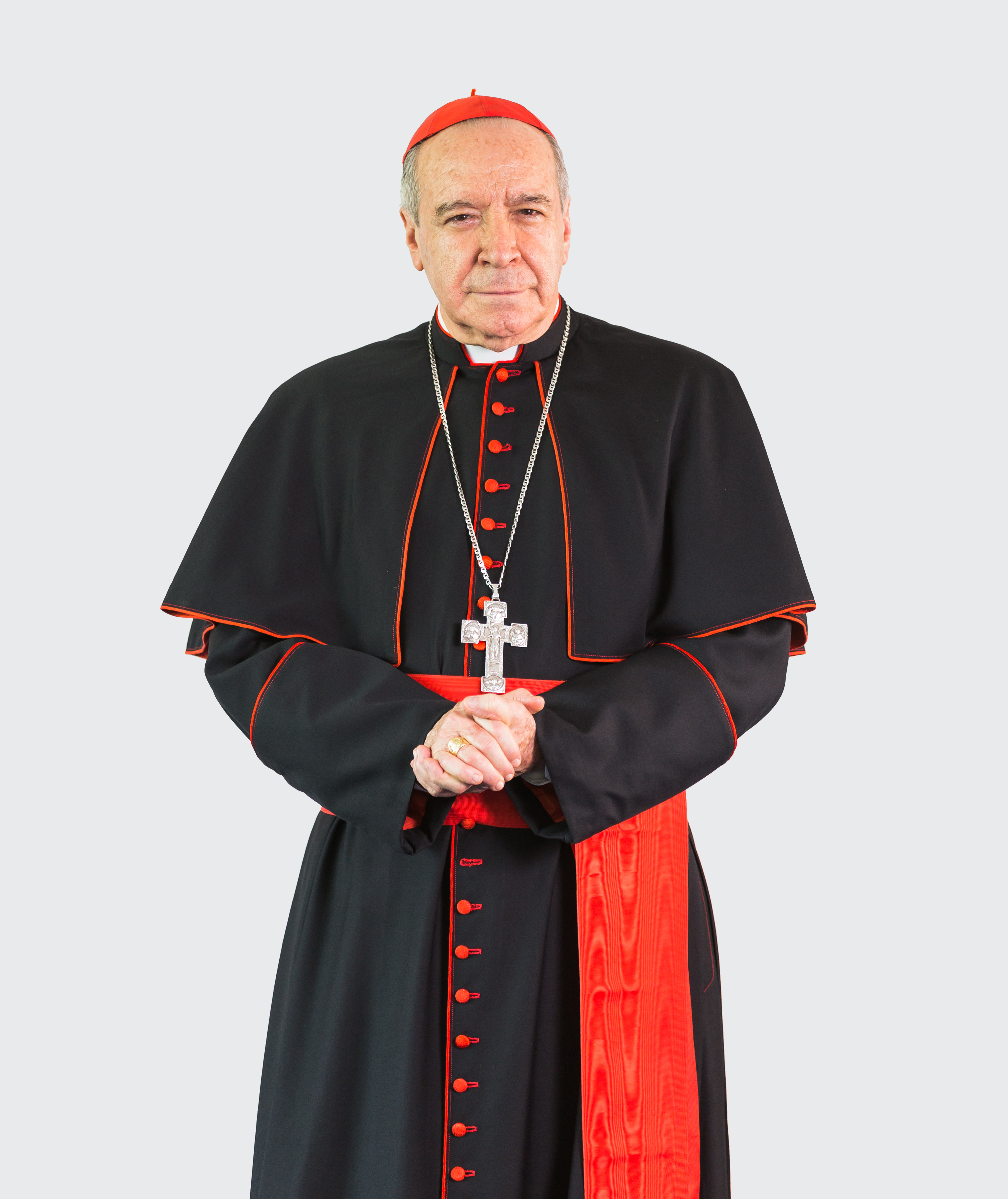 Cardenal Nicolás de Jesús López Rodríguez